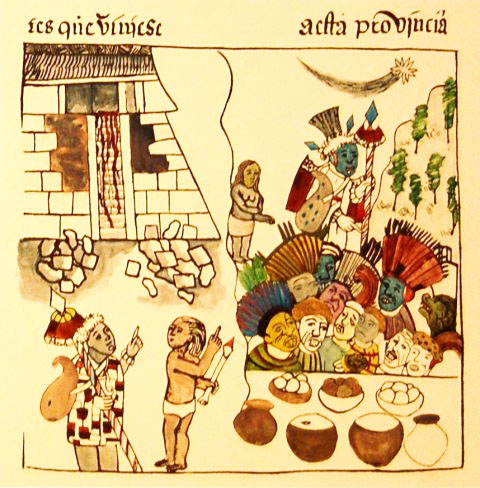 prêtres Purepecha avec leurs attrbuts : lance et calebasse (1540)